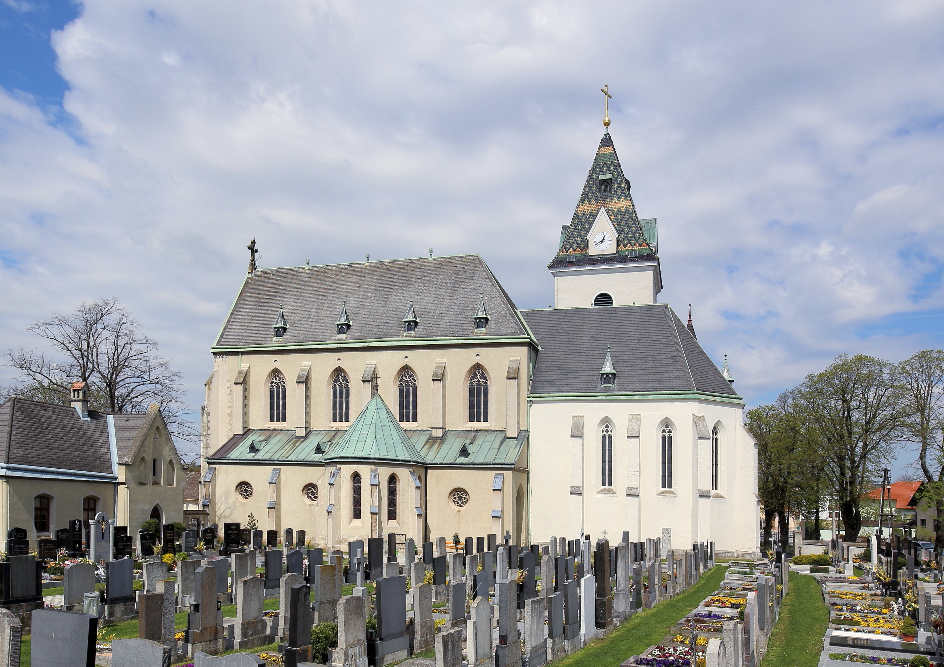 Südansicht der katholischen Pfarrkirche Mariae Himmelfahrt in der niederösterreichischen Marktgemeinde Großengersdorf. Der Chor mit 5/8-Schluß wurde Ende des 14. Jahrhunderts errichtet und das Untergeschoß des wuchtigen Nordturmes stammt aus dem 15. Jahrhundert. Das neogotische Langhaus wurde von 1897 bis 1901 nach Plänen des Architekten Eugen Schweigl errichtet.